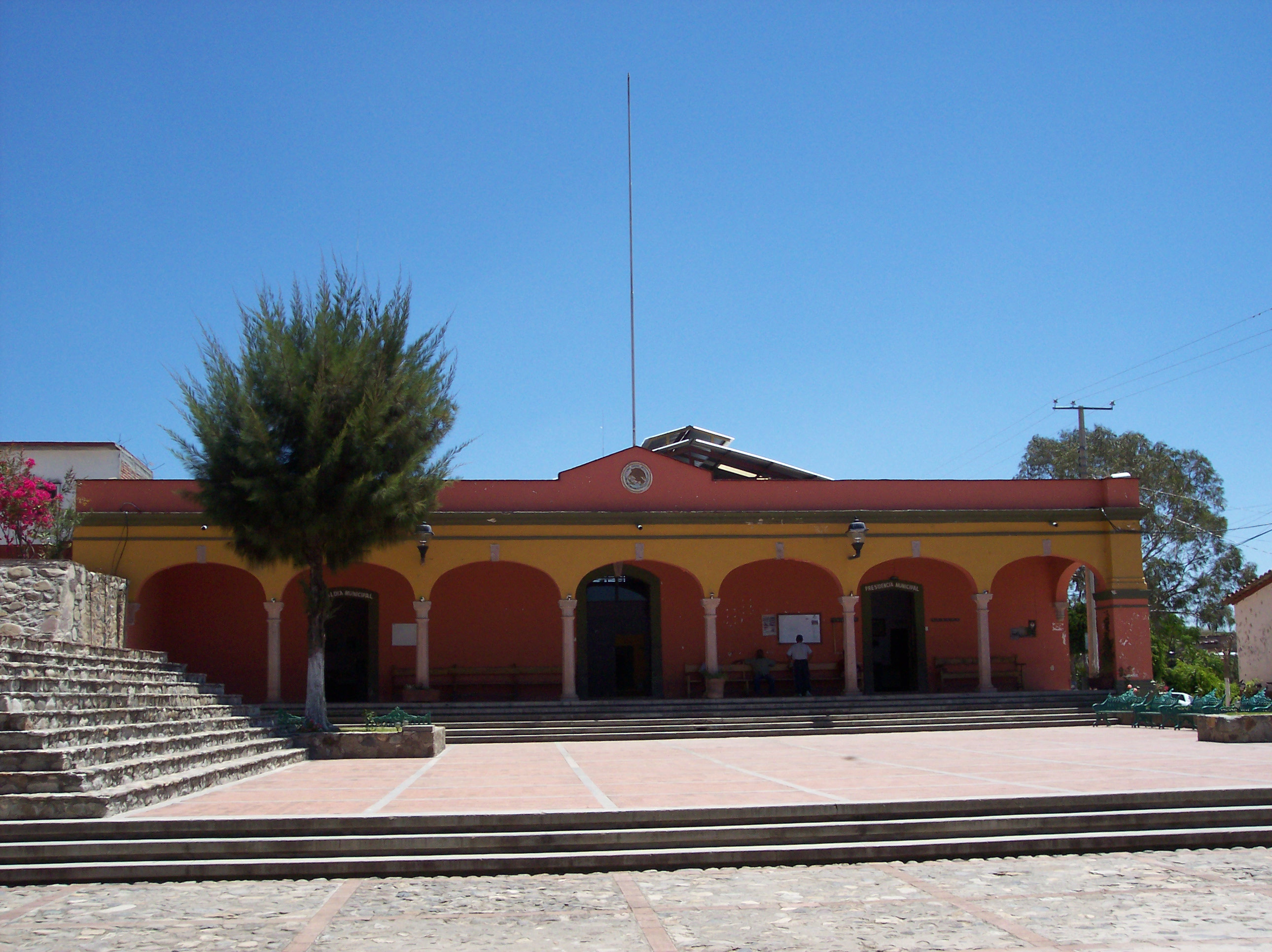 Municipal Palace of Teotitlán del Valle town. SPANSIH: Palacio Municipal Located in: Teotitlán del Valle, Oaxaca. Mexico.